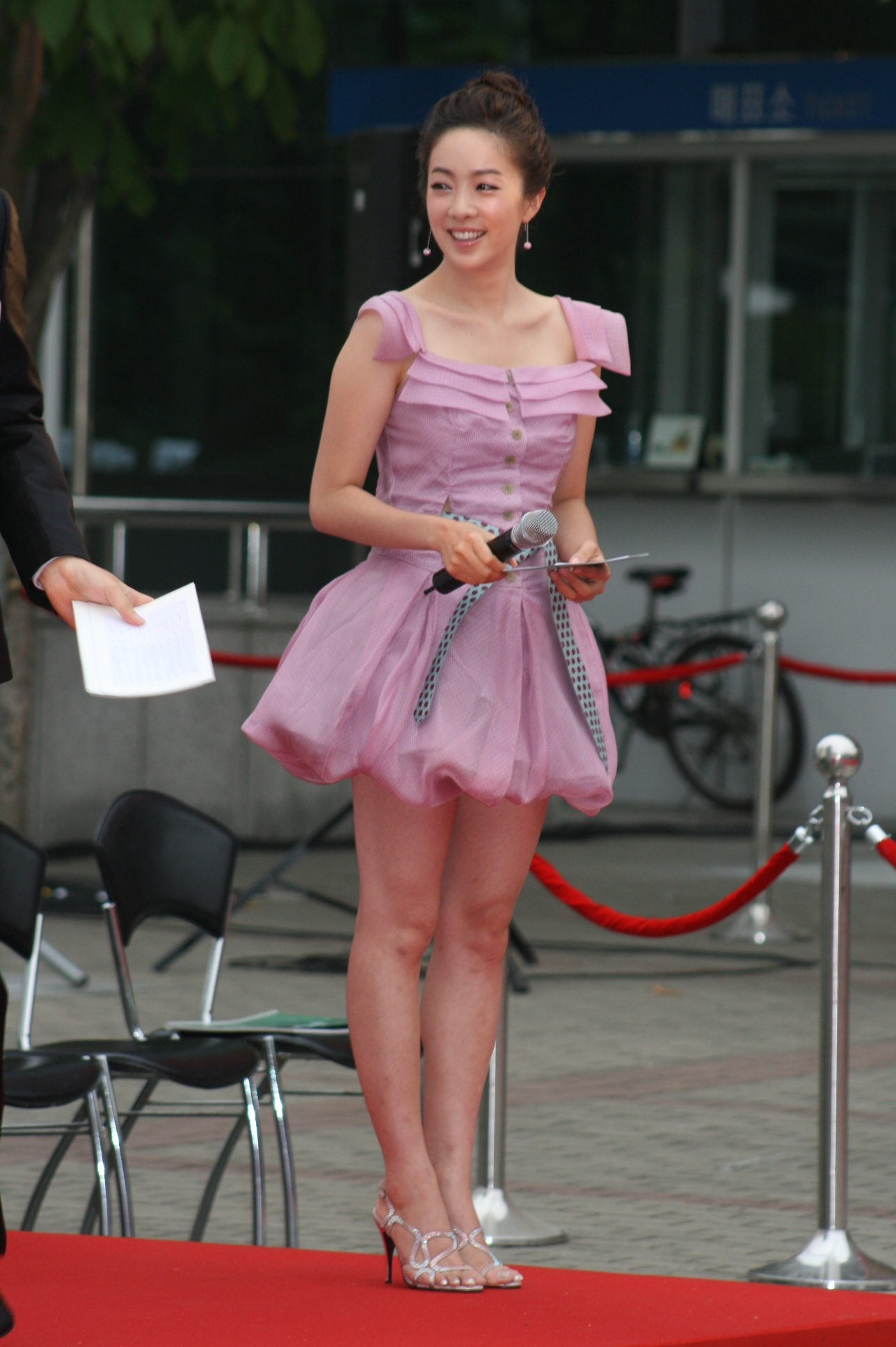 KBS 아나운서 박은영